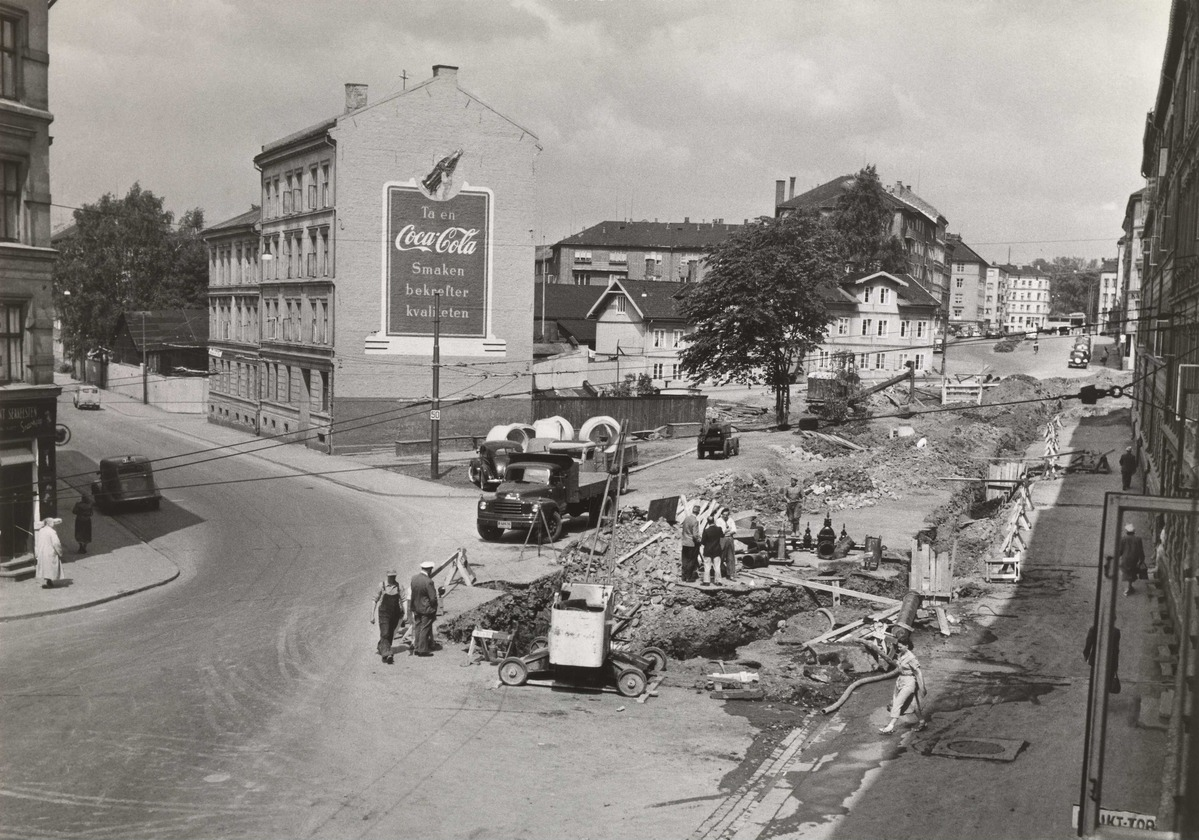 Arbeid med infrastruktur i Kjølberggata 1956. Trehusene bak treet midt på bildet hadde adresse Sverres gate 21 og 23, og er nå revet.